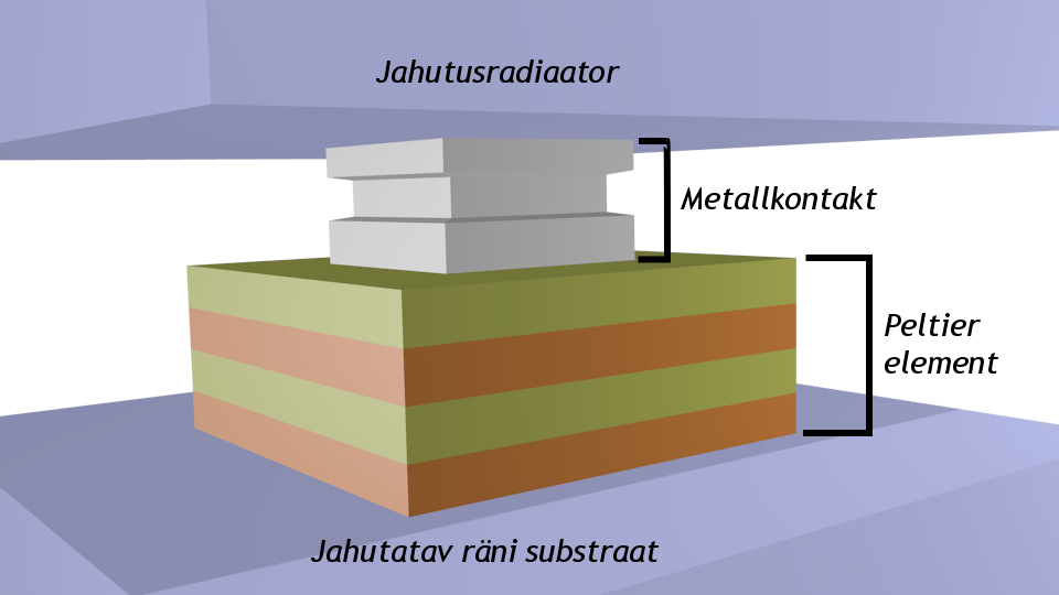 Transversaalne integreeritud Peltier element.